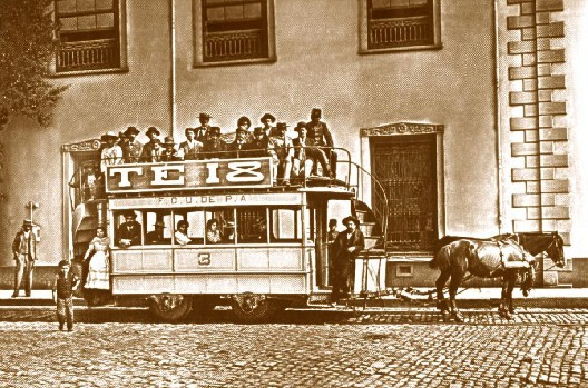 Ferrocarril Urbano de Playa ancha